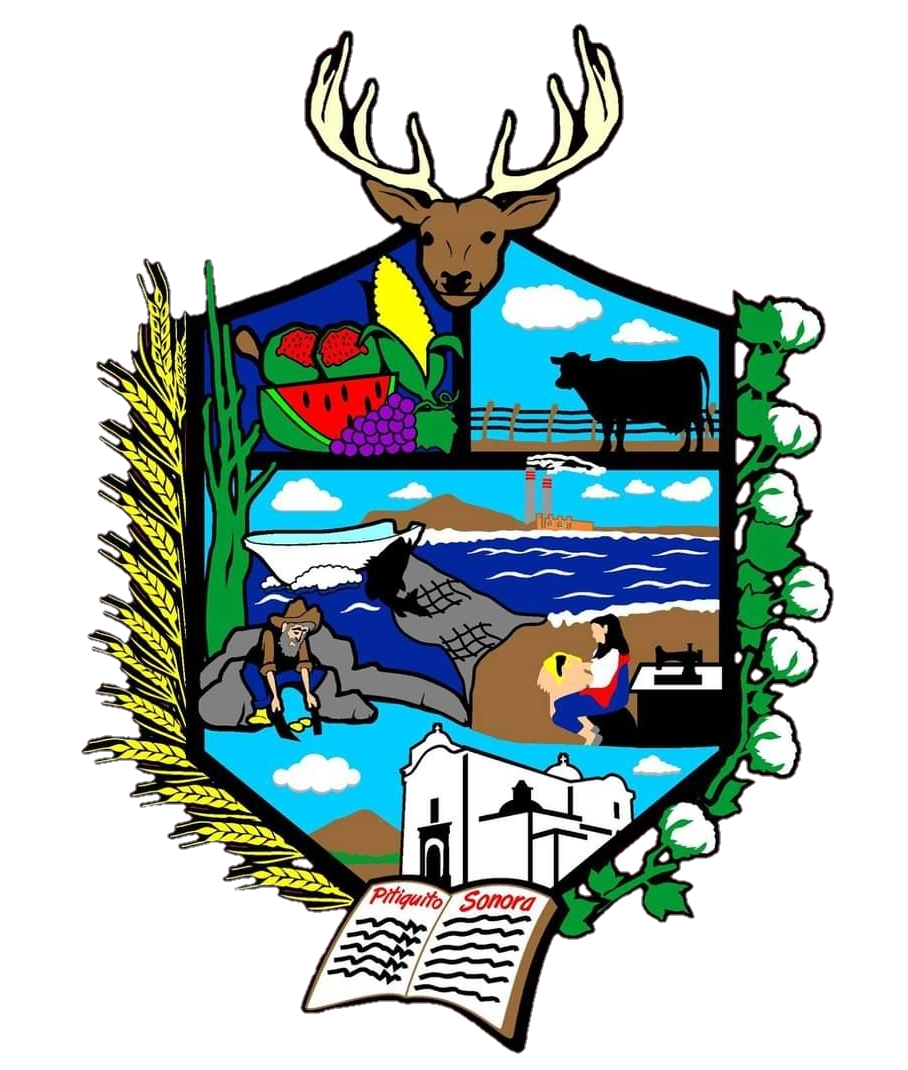 Escudo del municipio sonorense.